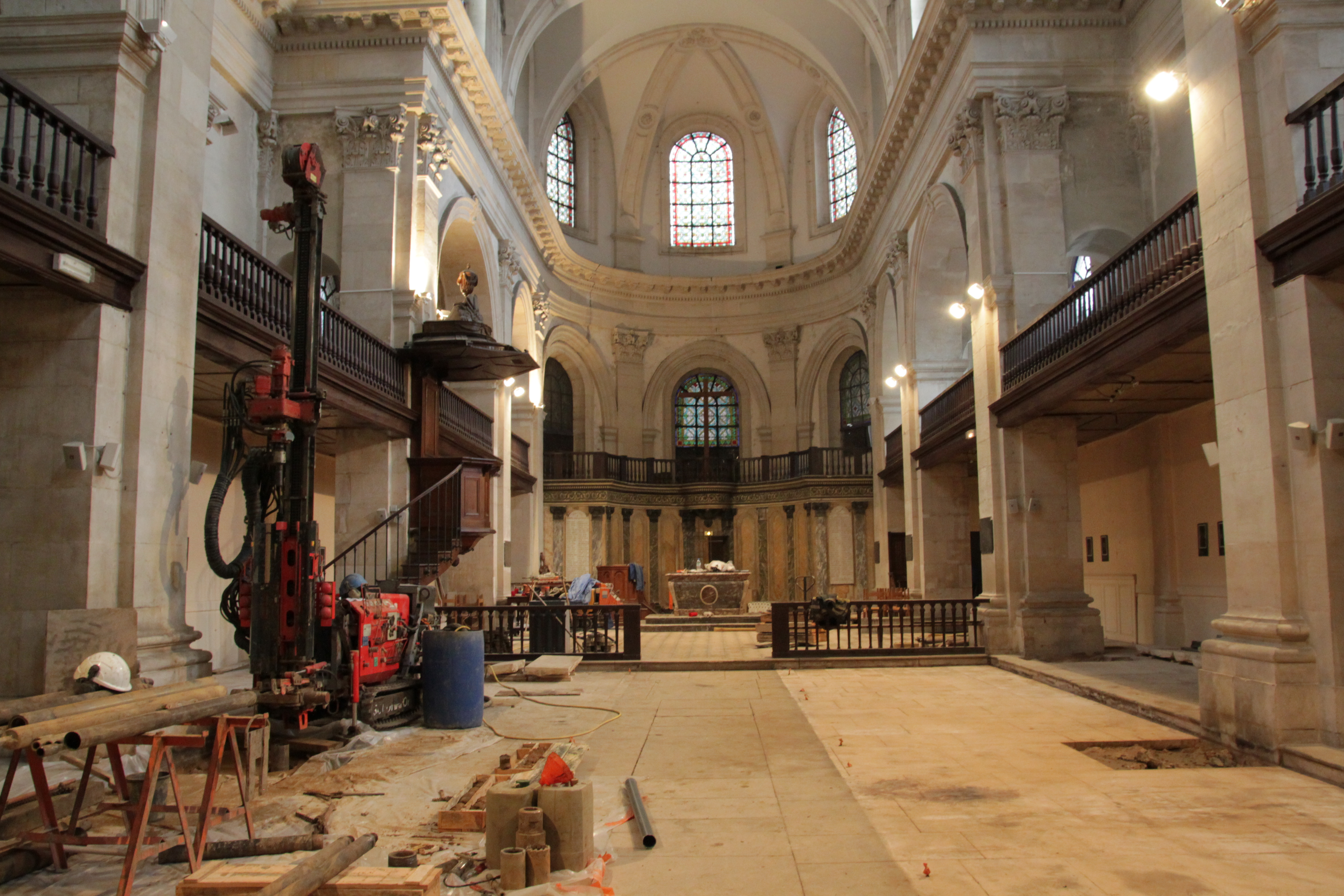 Chantier dans le temple protestant de Nancy suite à des désordres structurels constatés sur l'édifice : étude de sol, carottage pour échantillons.